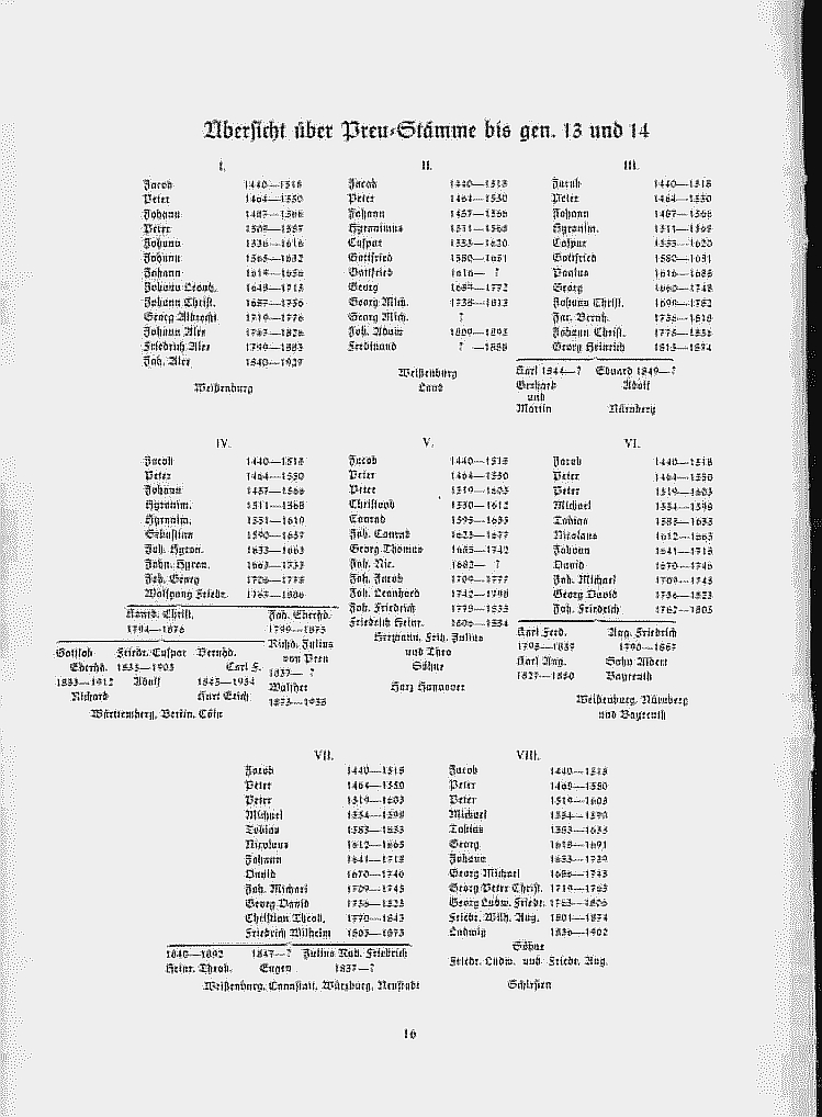 Staemme der Preu